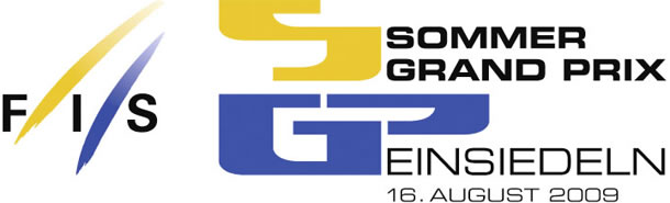 Logo des Sommergrandprix Einsiedeln